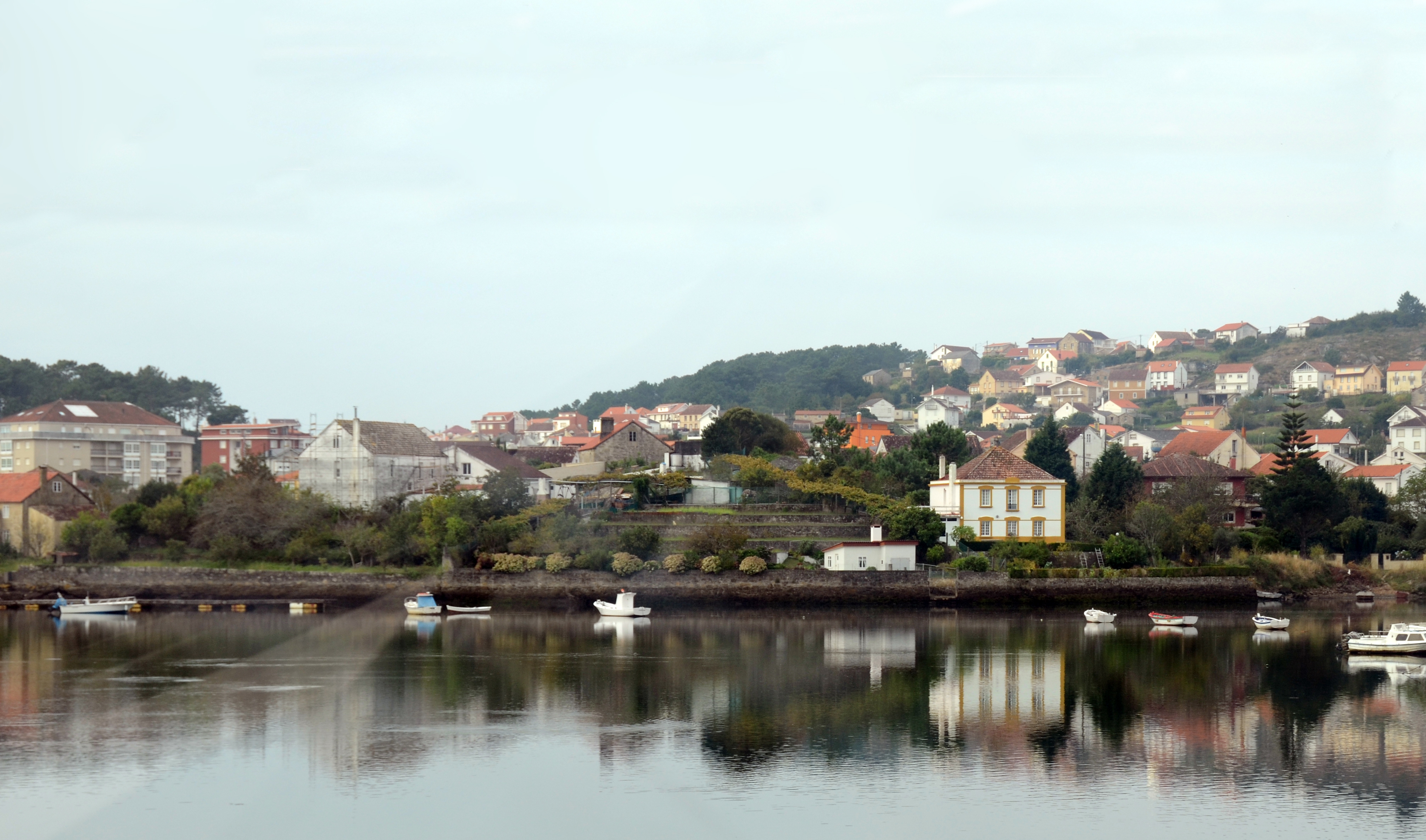 Creo de Esteiro, Muros, España